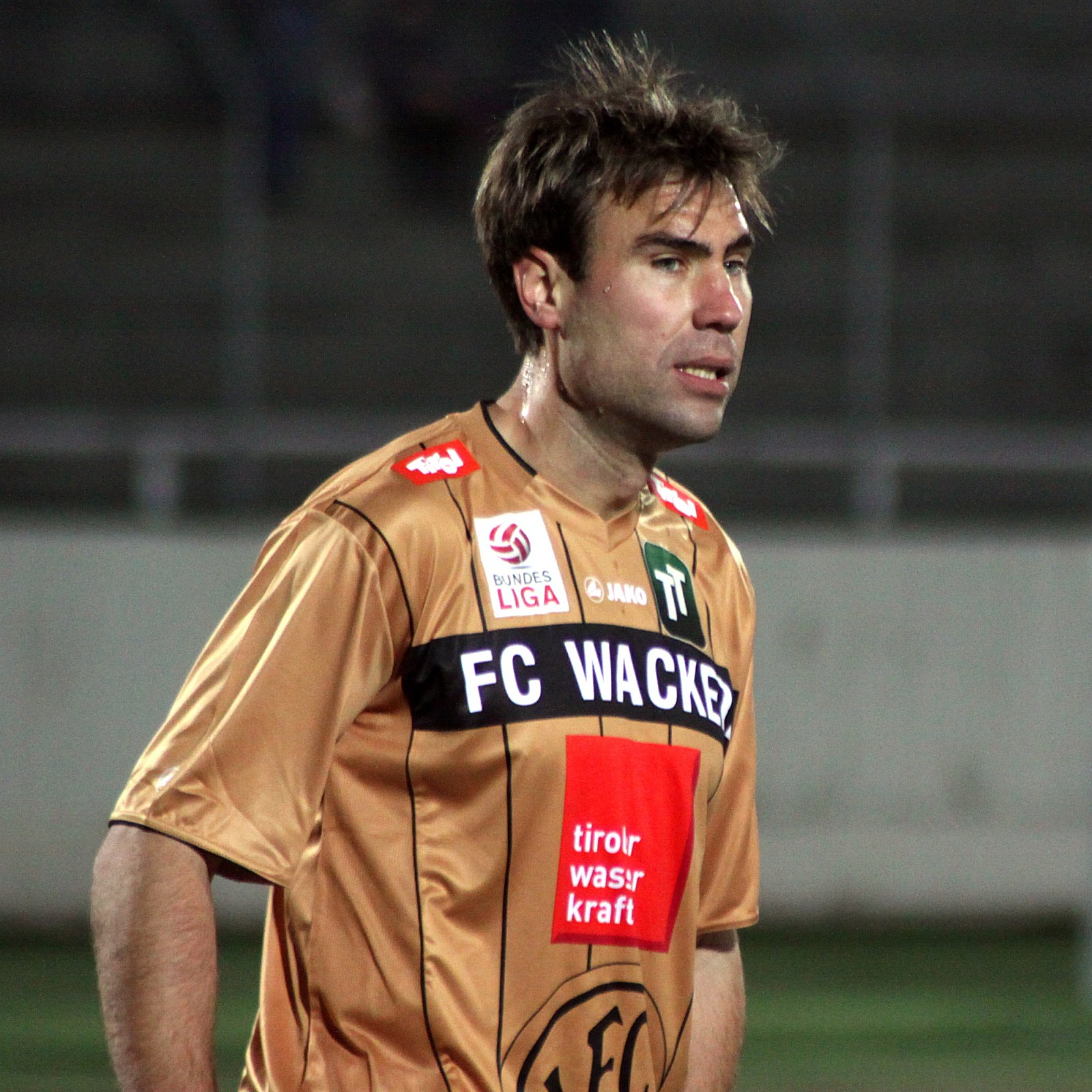 Meisterschaftsspiel der österreichischen Bundesliga: SC Wiener Neustadt gegen FC Wacker Innsbruck am 25. Februar 2012 (0:0) im Wiener Nweustädter Stadion. - Das Foto zeigt Iñaki Bea Jauregi (FC Wacker Innsbruck).